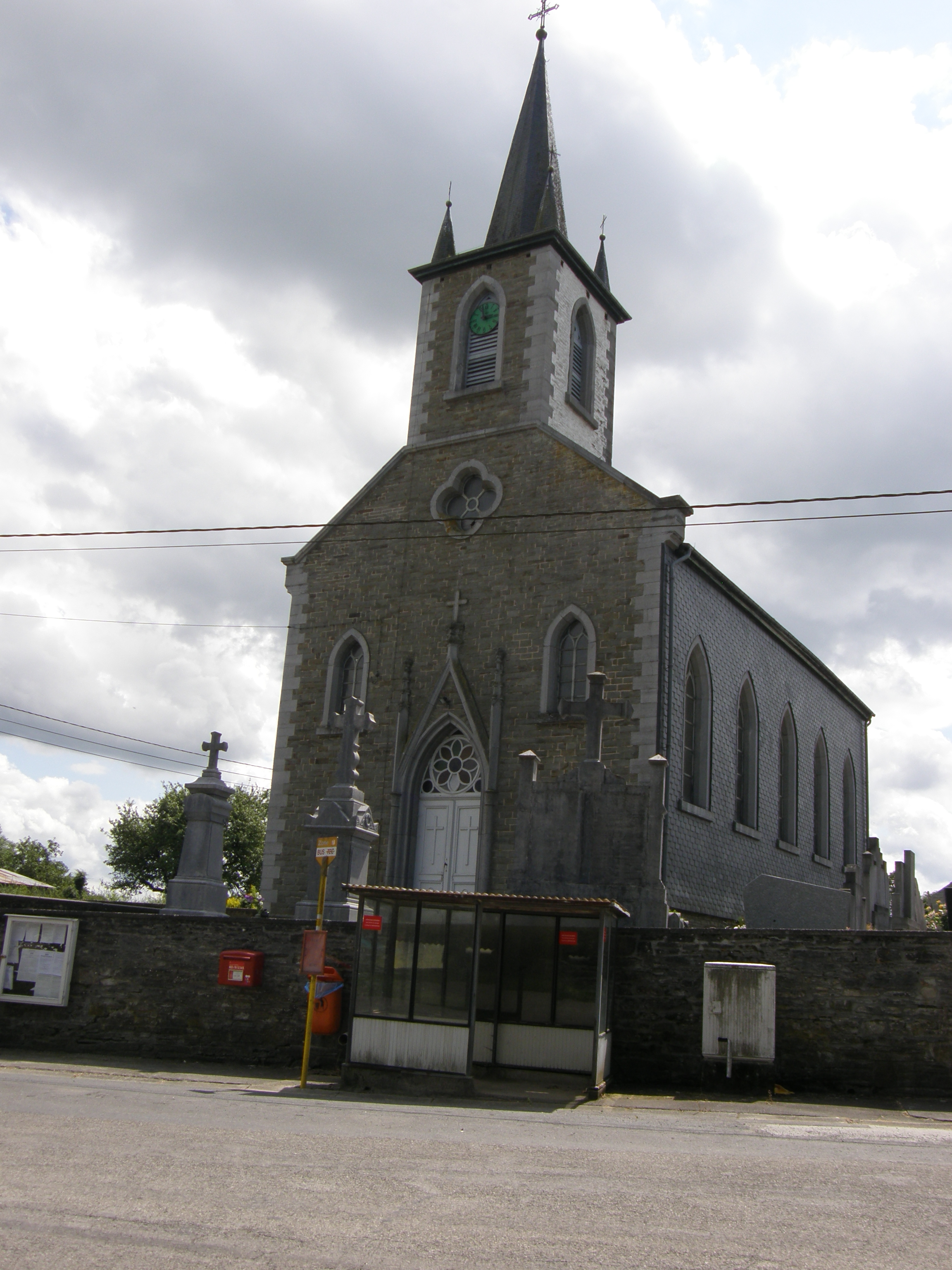 L'église de Biourges dans la commune de Bertrix (section Orgeo) en Belgique